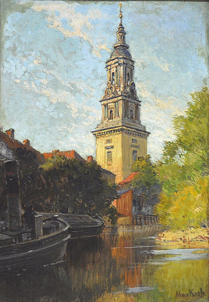 Ansicht von Potsdam mit Heilig-Geist-Kirche. Öl auf Holz, 50 x 35 cm